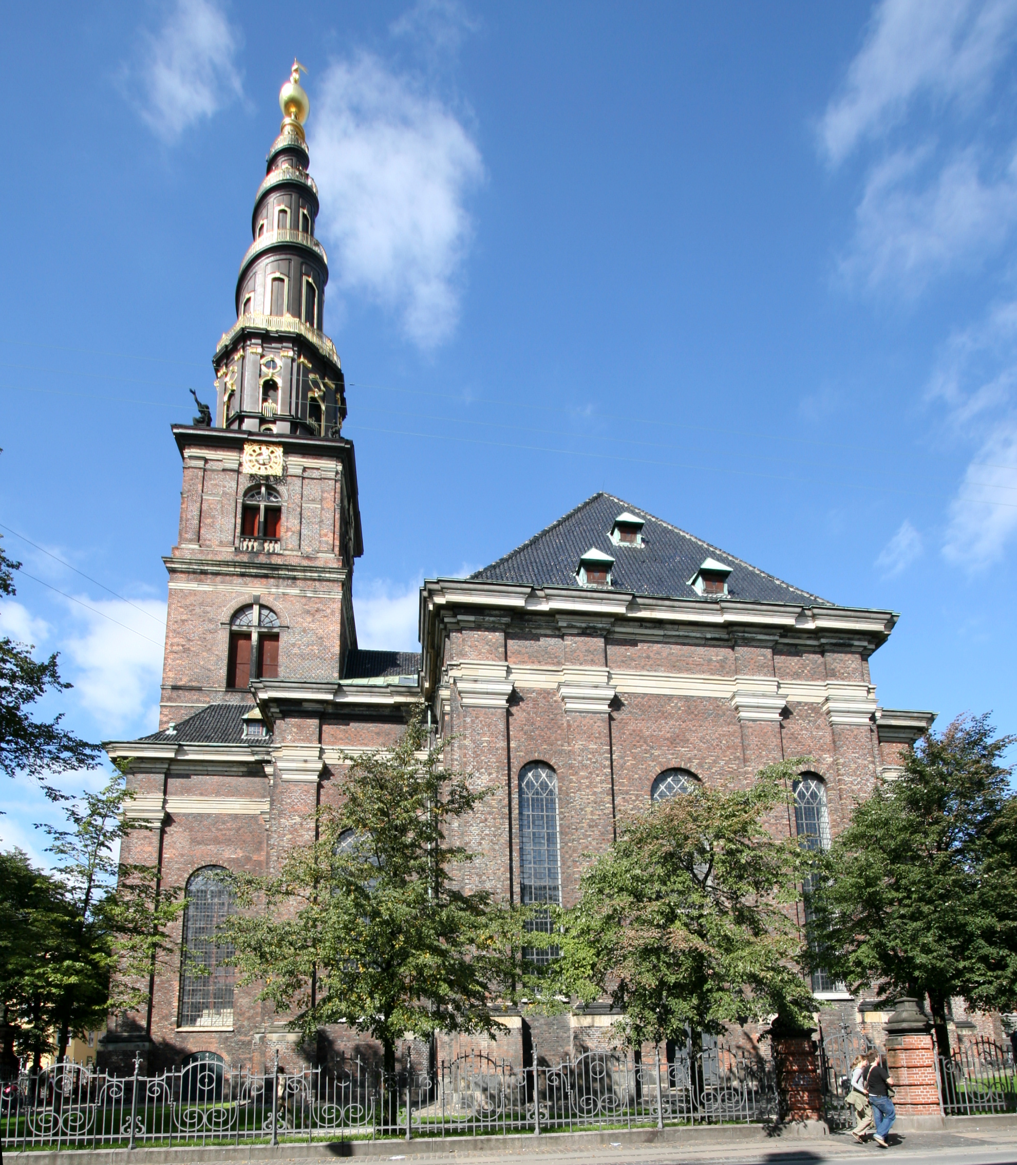 Vor Frelser Kirke (Church of Our Saviour), Copenhagen, Denmark.